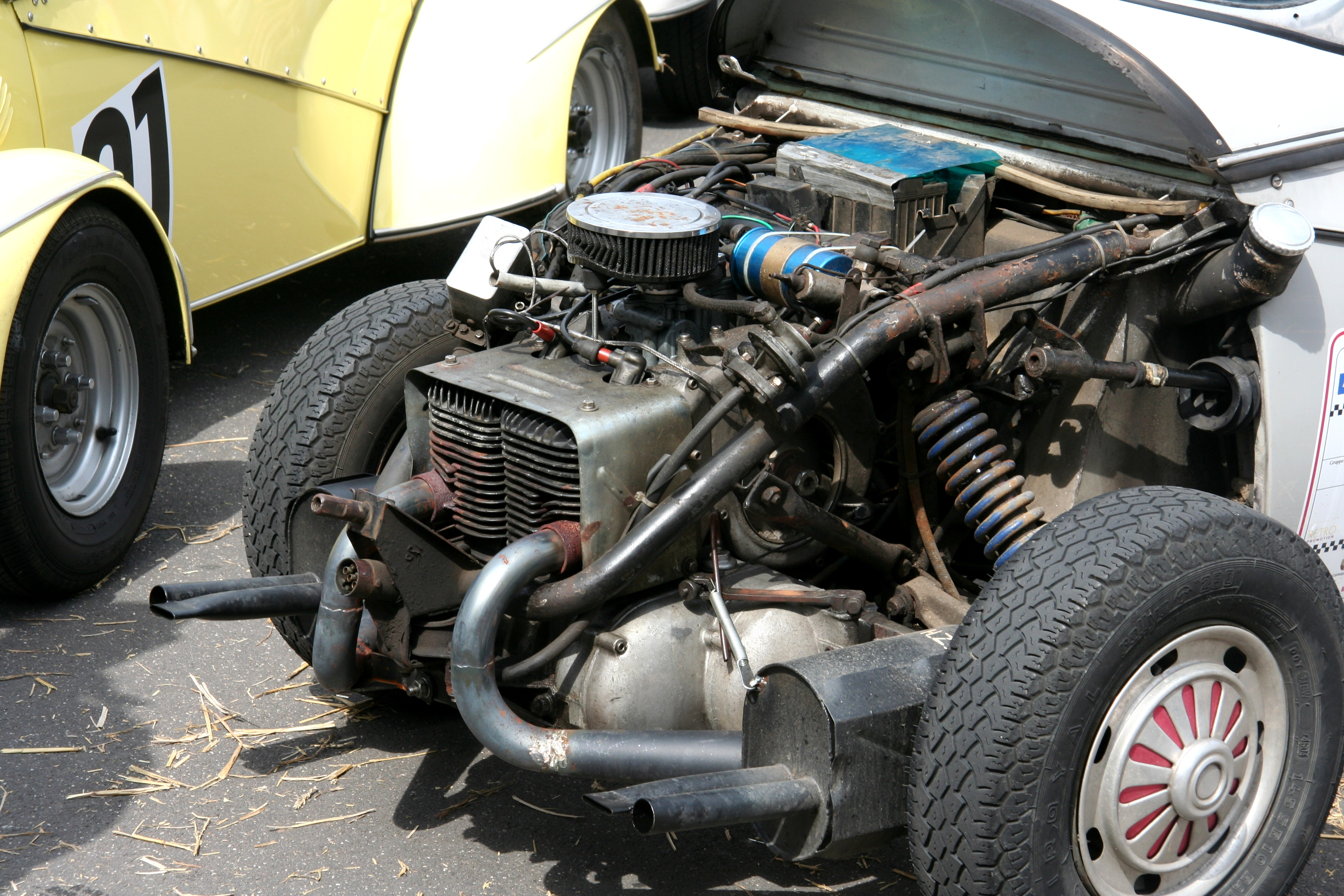 Motor eines FMR Tg 500 beim AvD-Oldtimer-Grand-Prix im Fahrerlager des Nürburgrings